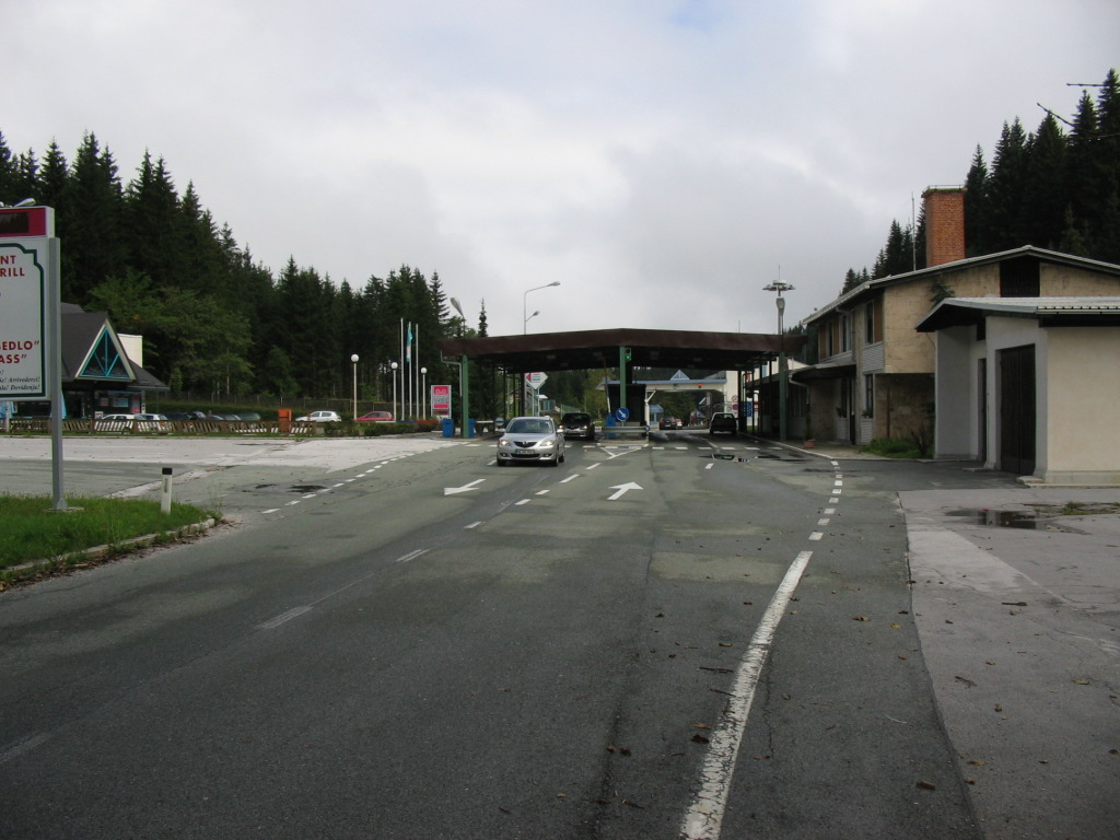 Mednarodni mejni prehod Korensko sedlo